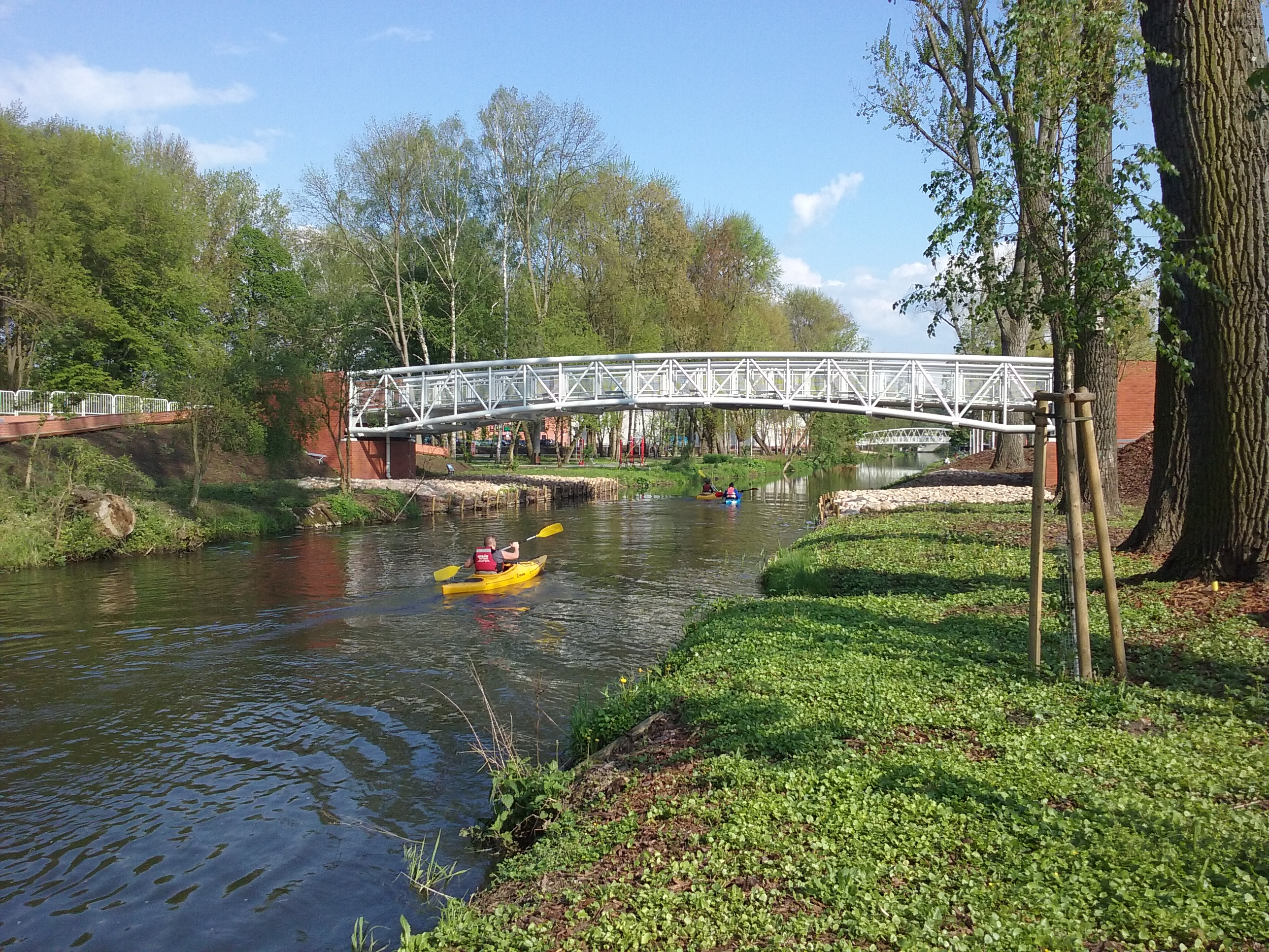 Tomaszów Mazowiecki w województwie łódzkim, PL, EU. Rzeka Wolbórka i powstałe w 2019 roku kładki pieszo-rowerowe. Część nowopowstałego Parku Miejskiego Bulwary w Tomaszowie, CC0